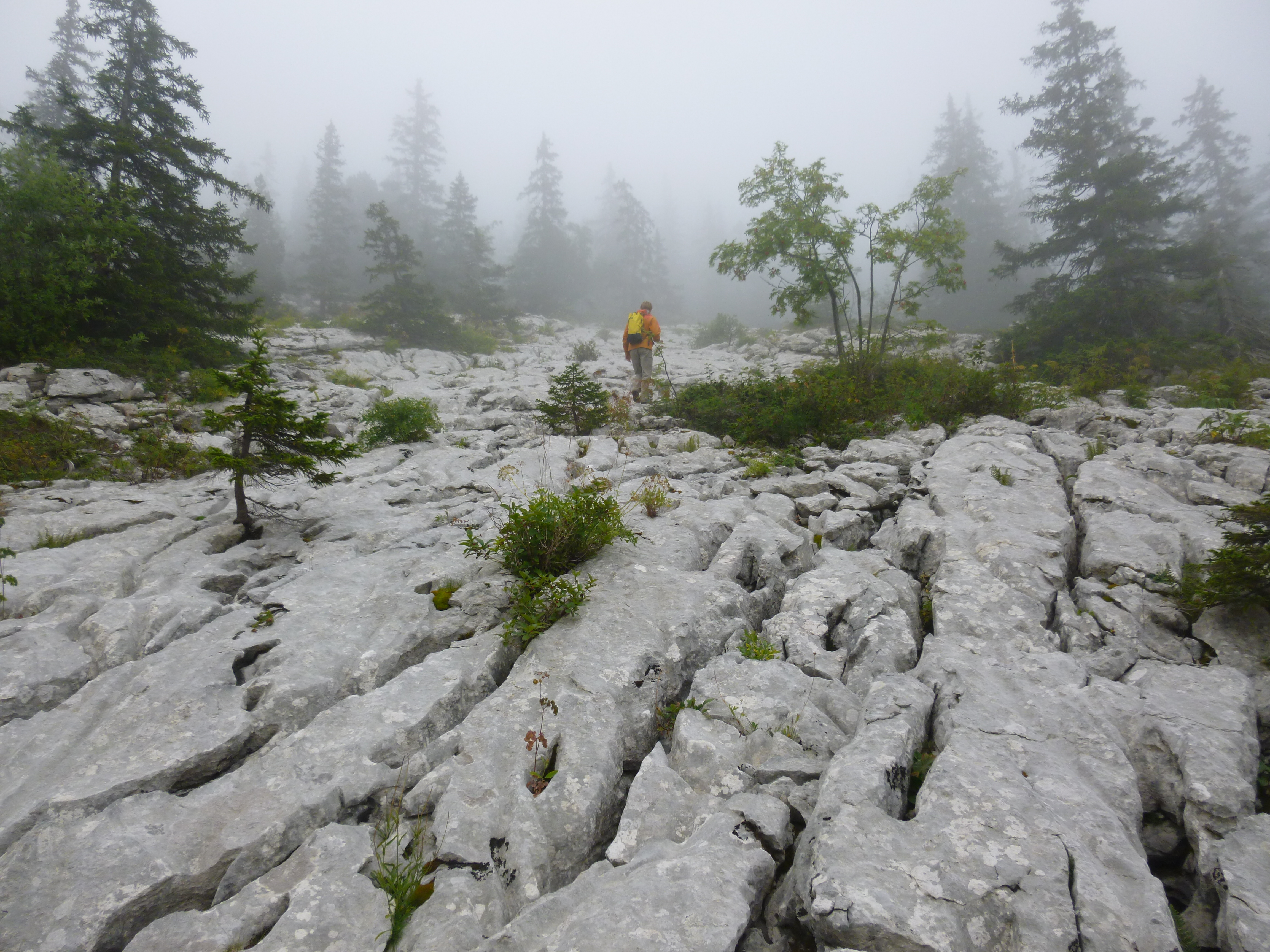 Les lapiaz forment des grandes dalles calcaires ou l'eau s'infiltre.